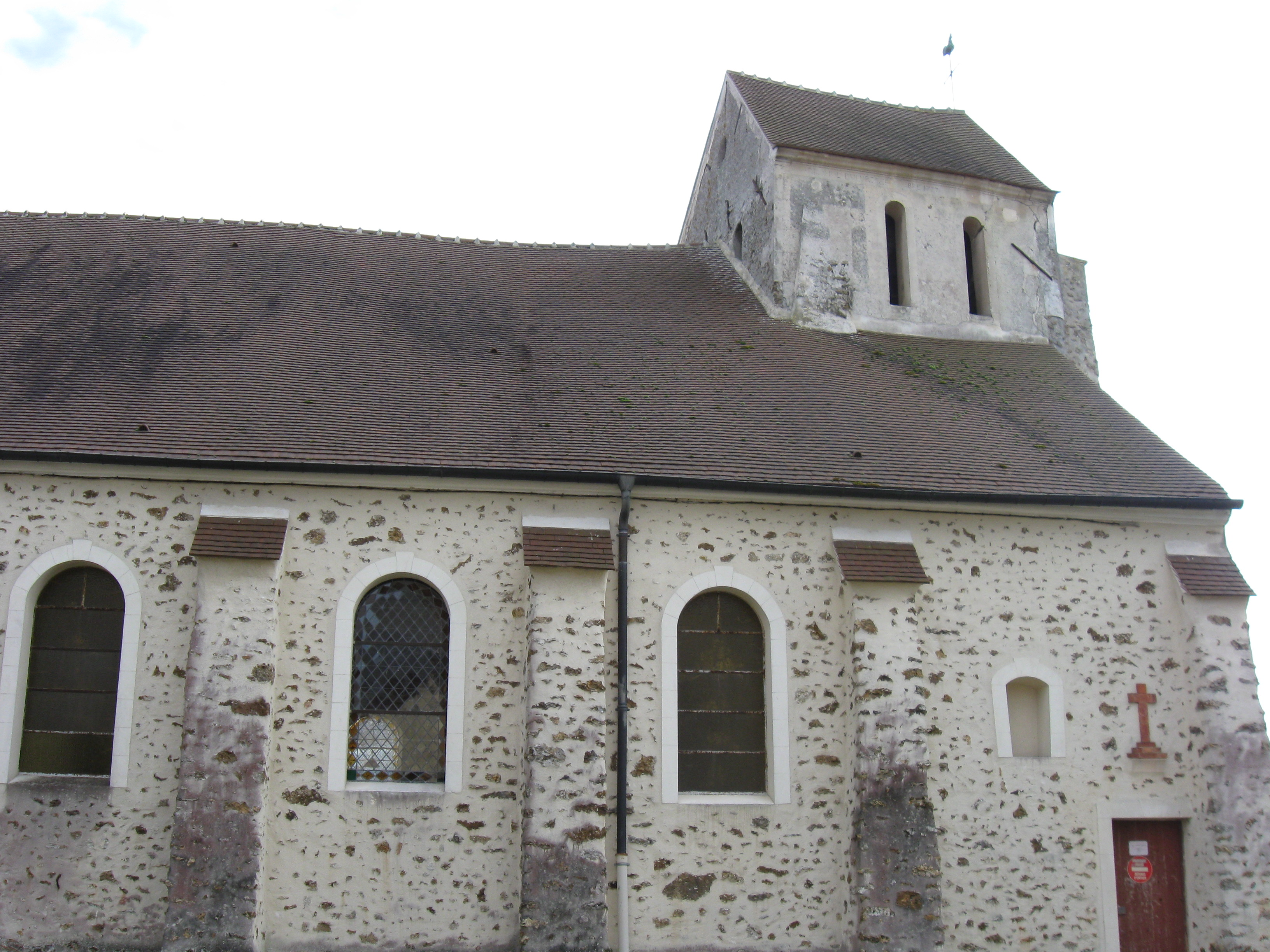 Église Saint-Christophe-et-Saint-Jacques-le-Majeur de Cocherel. (Seine-et-Marne, région Île-de-France).